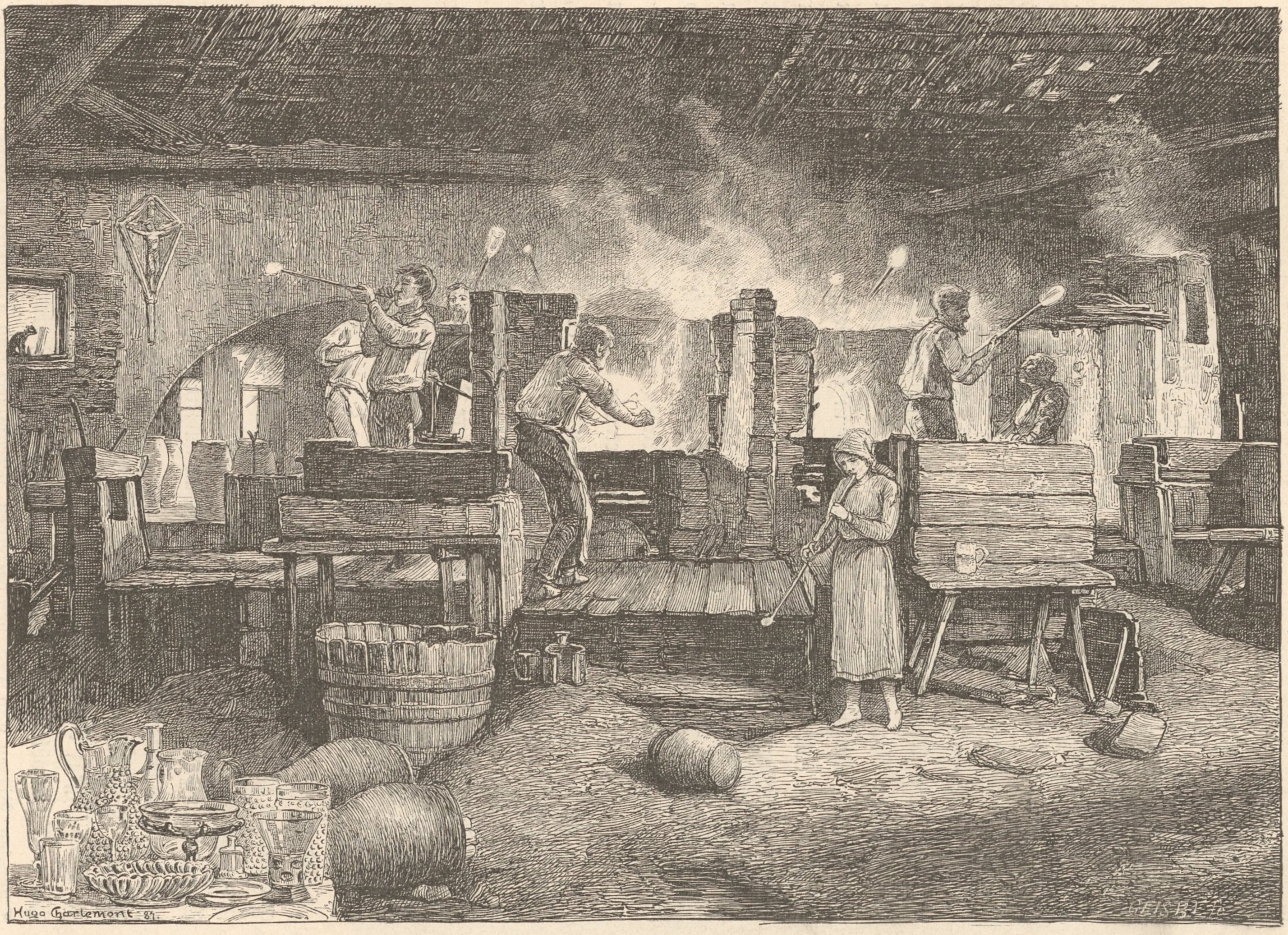 Innenansicht einer Glashütte im Bachergebirge (Pohorje)